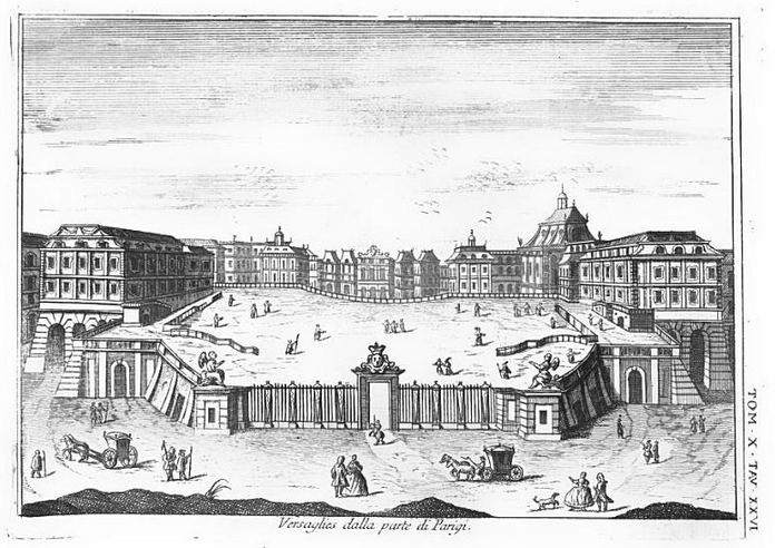 Planche Versailles, Nuovo Dizionario, tomeX, p. 283, Venise 1751